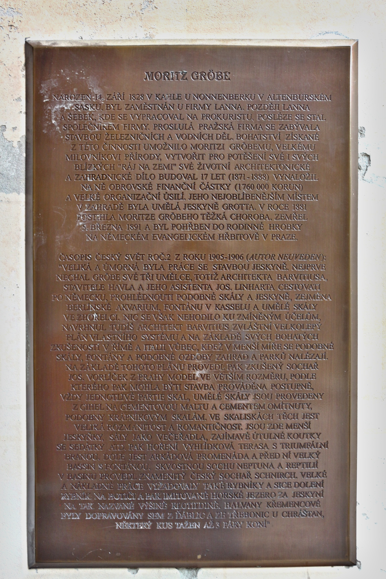 Havlíčkovy sady v Praze, pamětní deska Moritze Gröbeho